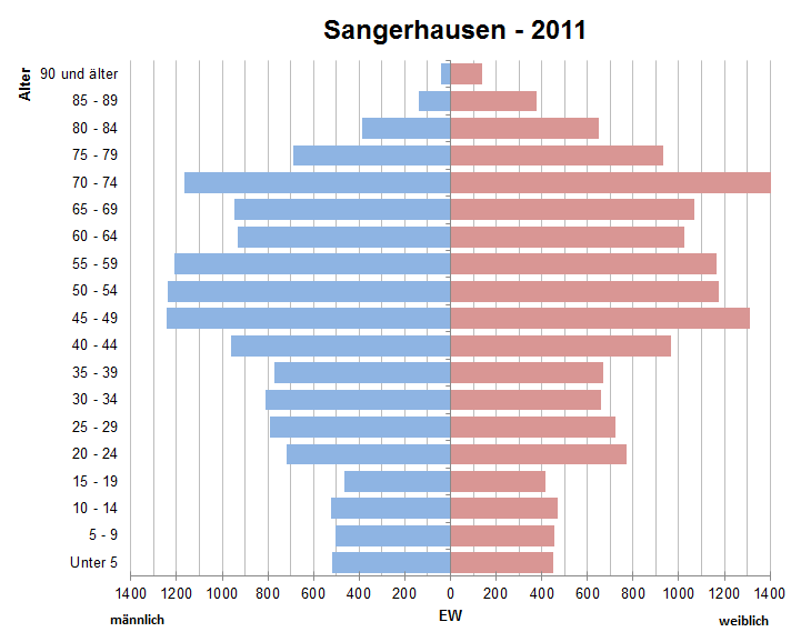 Bevölkerungspyramide der Stadt Sangerhausen nach Zensus 2011.